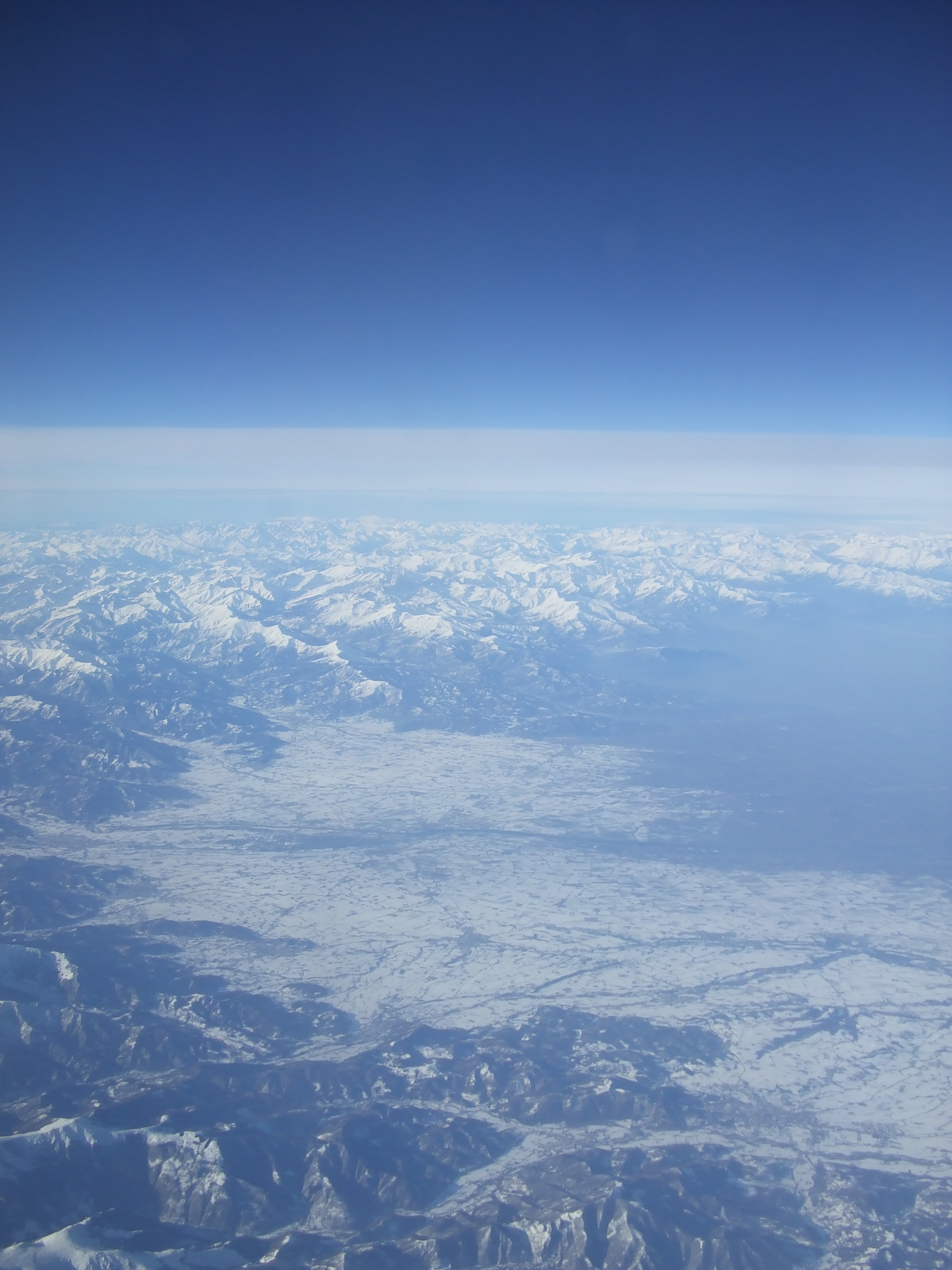 ES Provincia de Cuneo, Piamonte. Vista desde un avión. EN Province of Cuneo, Piedmont. Sight from a plane.